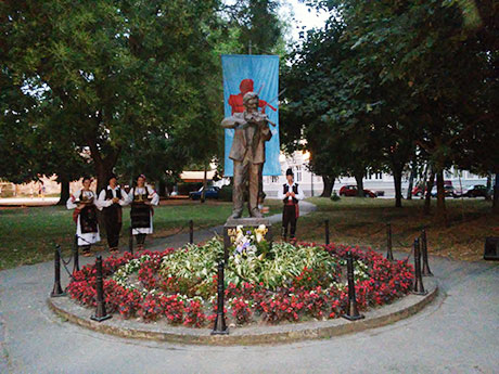 Српски (ћирилица): Споменик